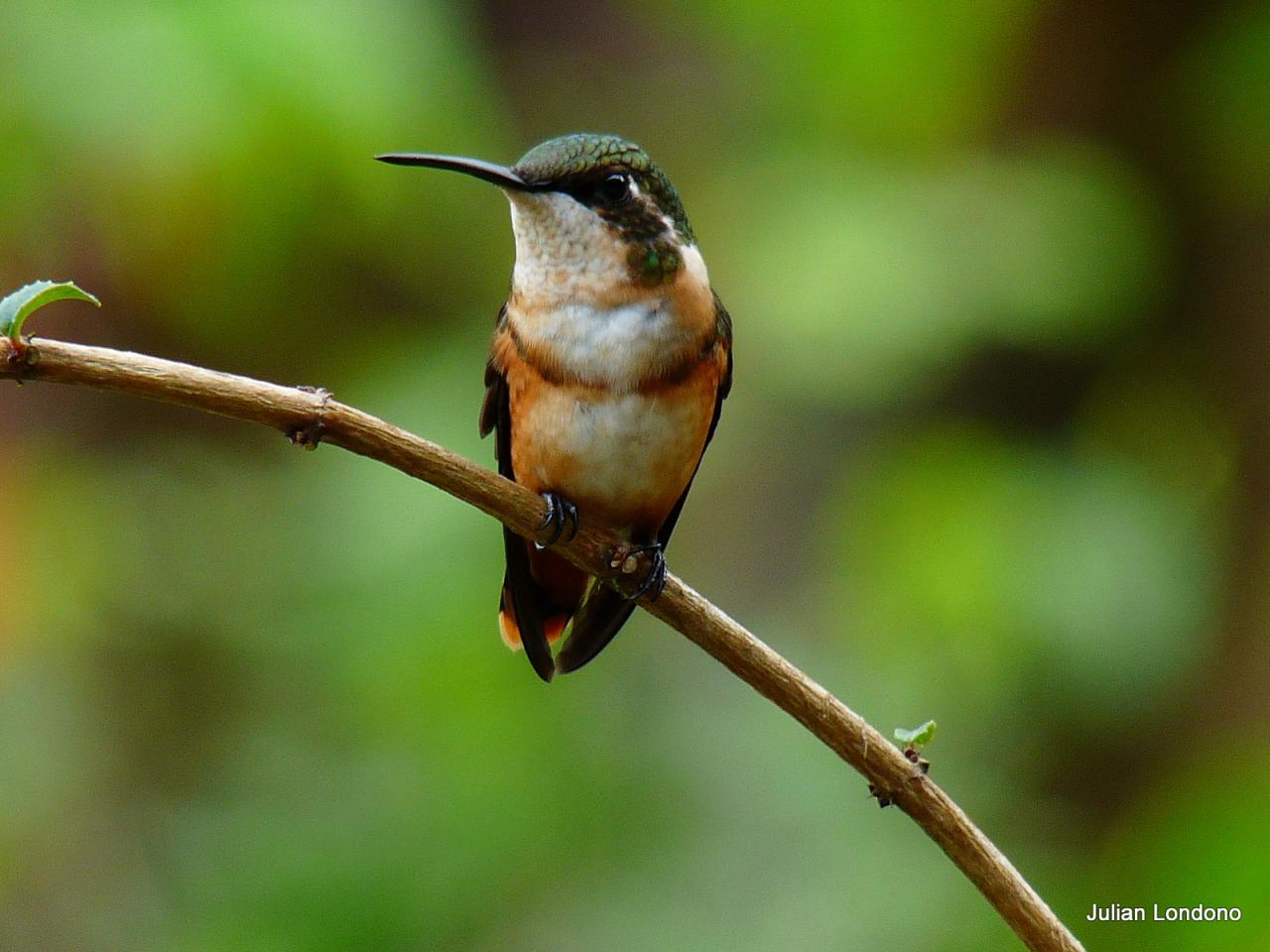 Hembra , mide unos 6 cm. Zumba como un abejorro, es tan pequeño que antes de verlo se oye el zumbido de sus alas. Se percha brevemente en ramas altas. Tomada en Aralcal, "El Bosque Cafetero" Manizales, Colombia. Puede oir el canto aquí: Le recomiendo éstas fotos de colibríes: SELECTED HUMMINGBIRDS Disfrute con muchas fotos de las aves de Aralcal a través de éste vínculo: Fotografía espontánea y al natural. Foto sin recortes o post-procesos